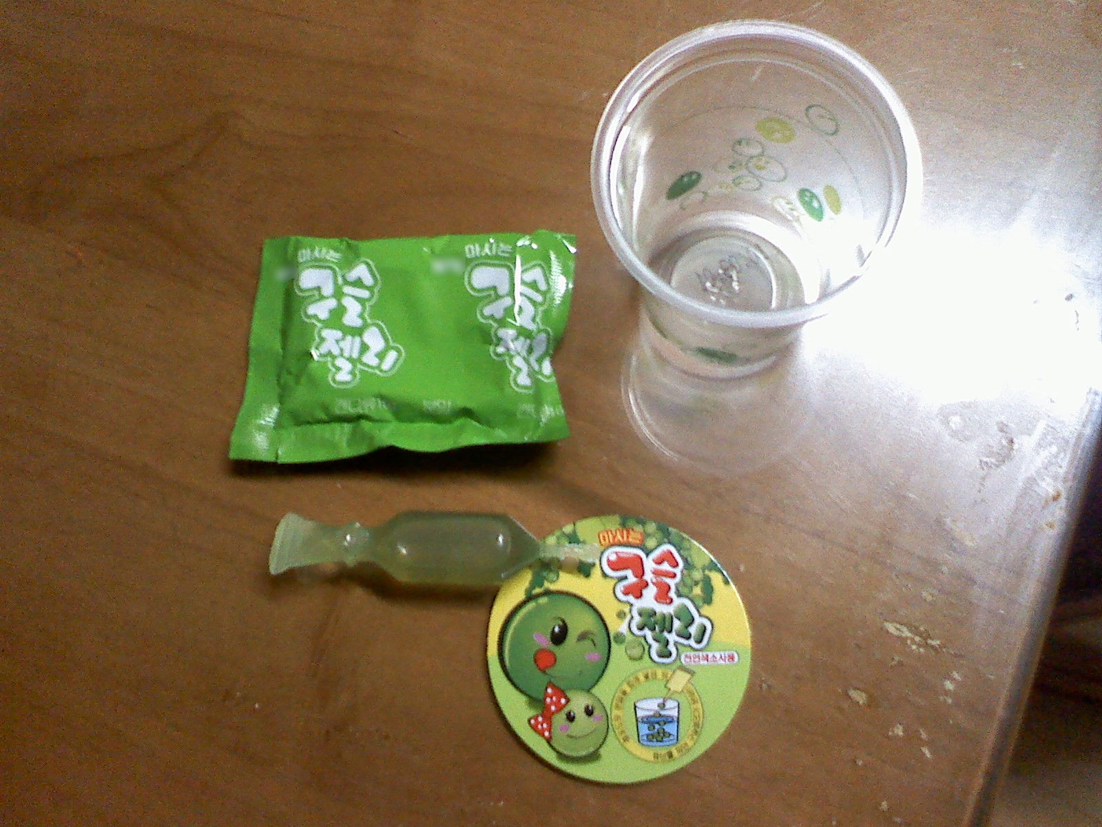 마시는 구슬젤리의 구성. 컵, 스프, 젤리 튜브가 있다.